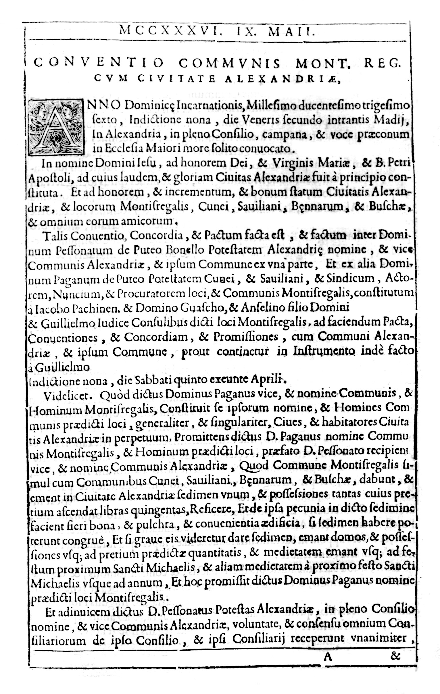 Frontespizio